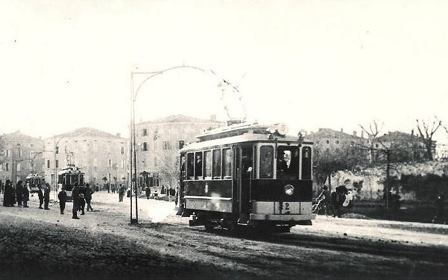 Modena - Inaugurazione tram